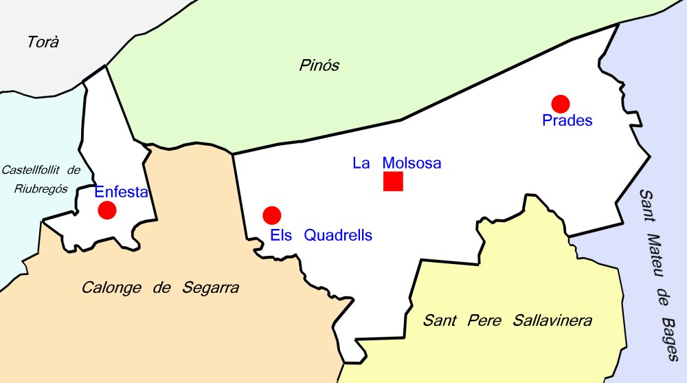 Mapa del municipi de La Molsosa (Solsonès) amb les seves entitats de població i els municipis limítrofes.